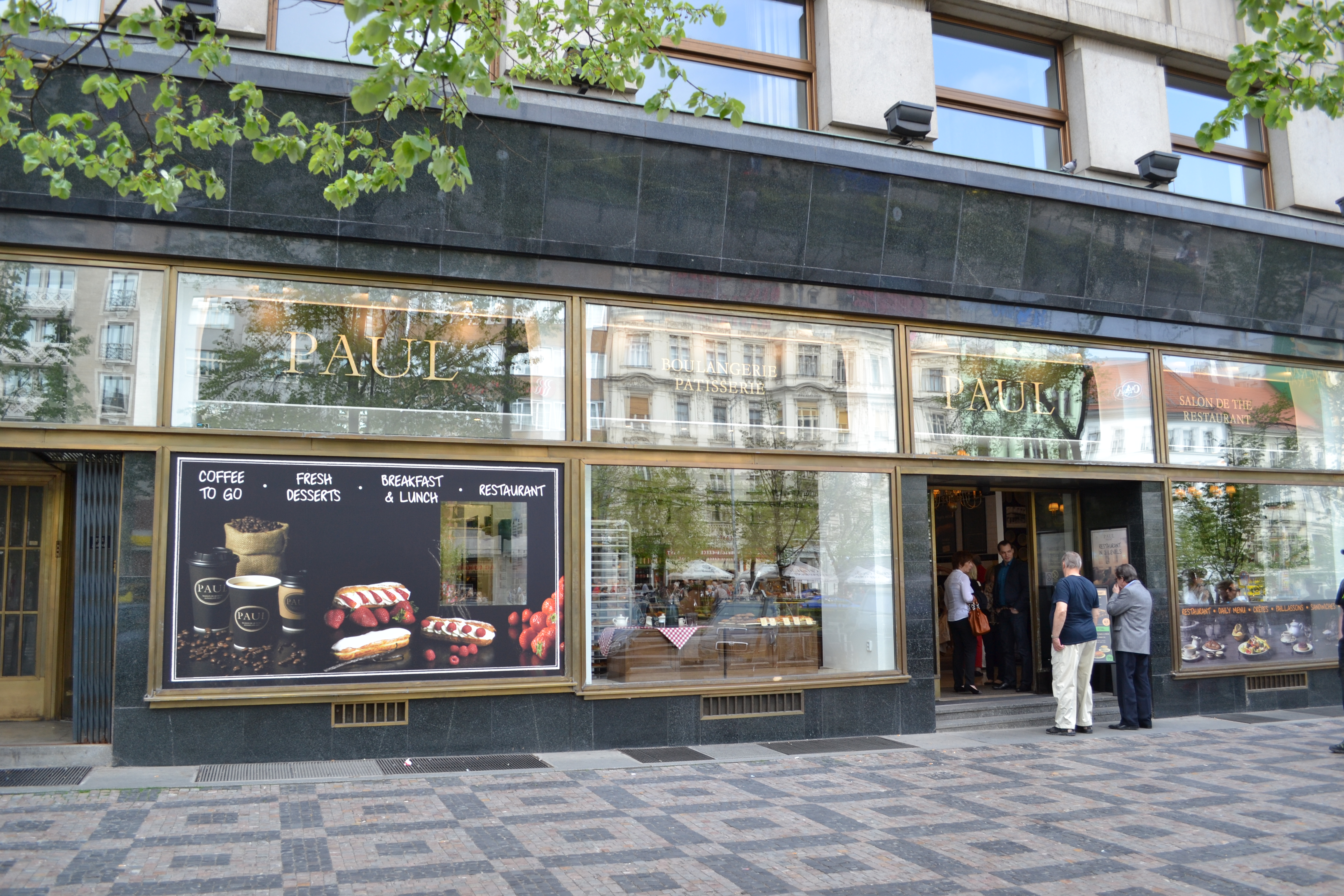 pobočka Paul na Václavské naměstí v Praze